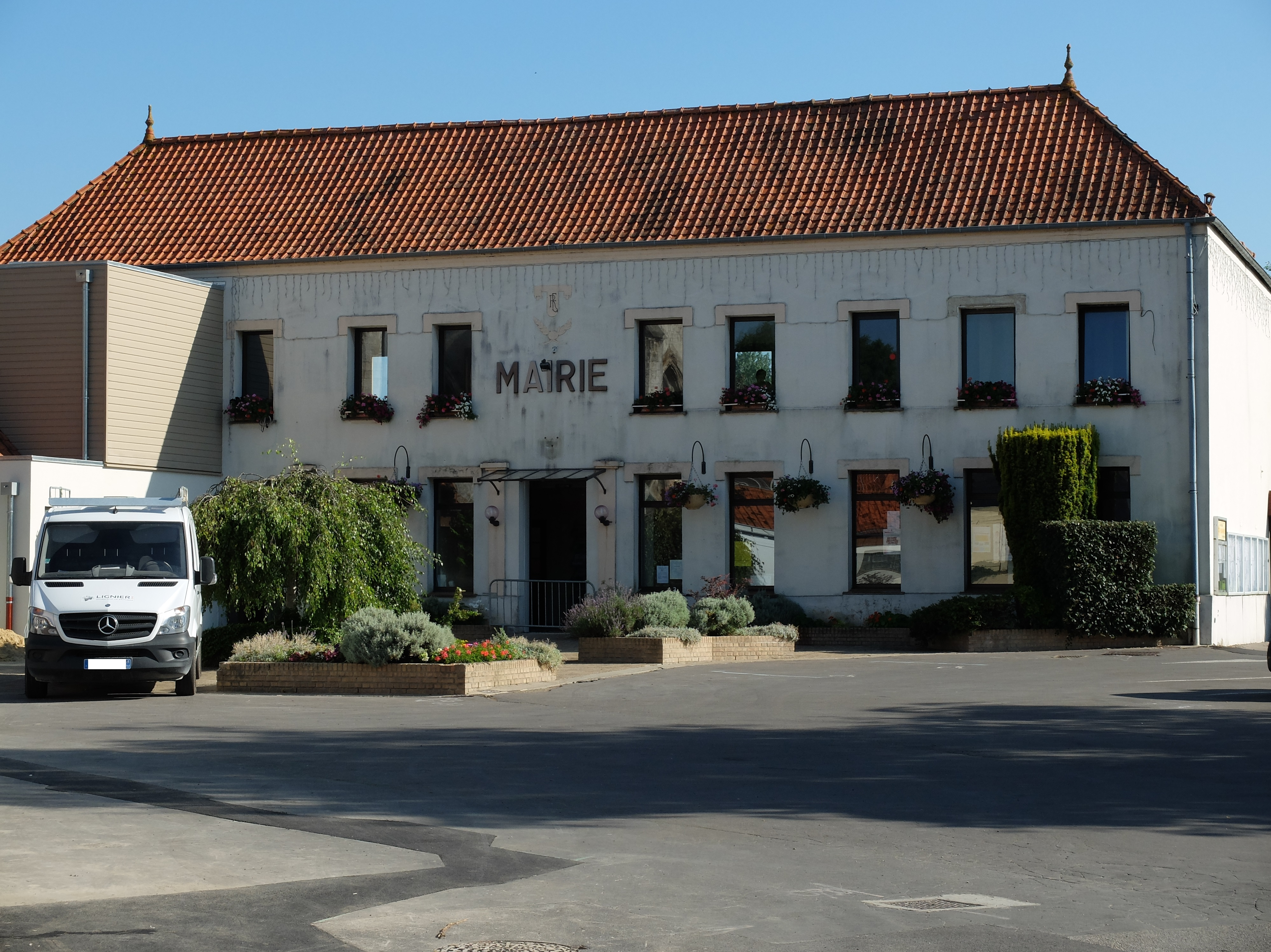 Vue de la mairie de Beaurainville.